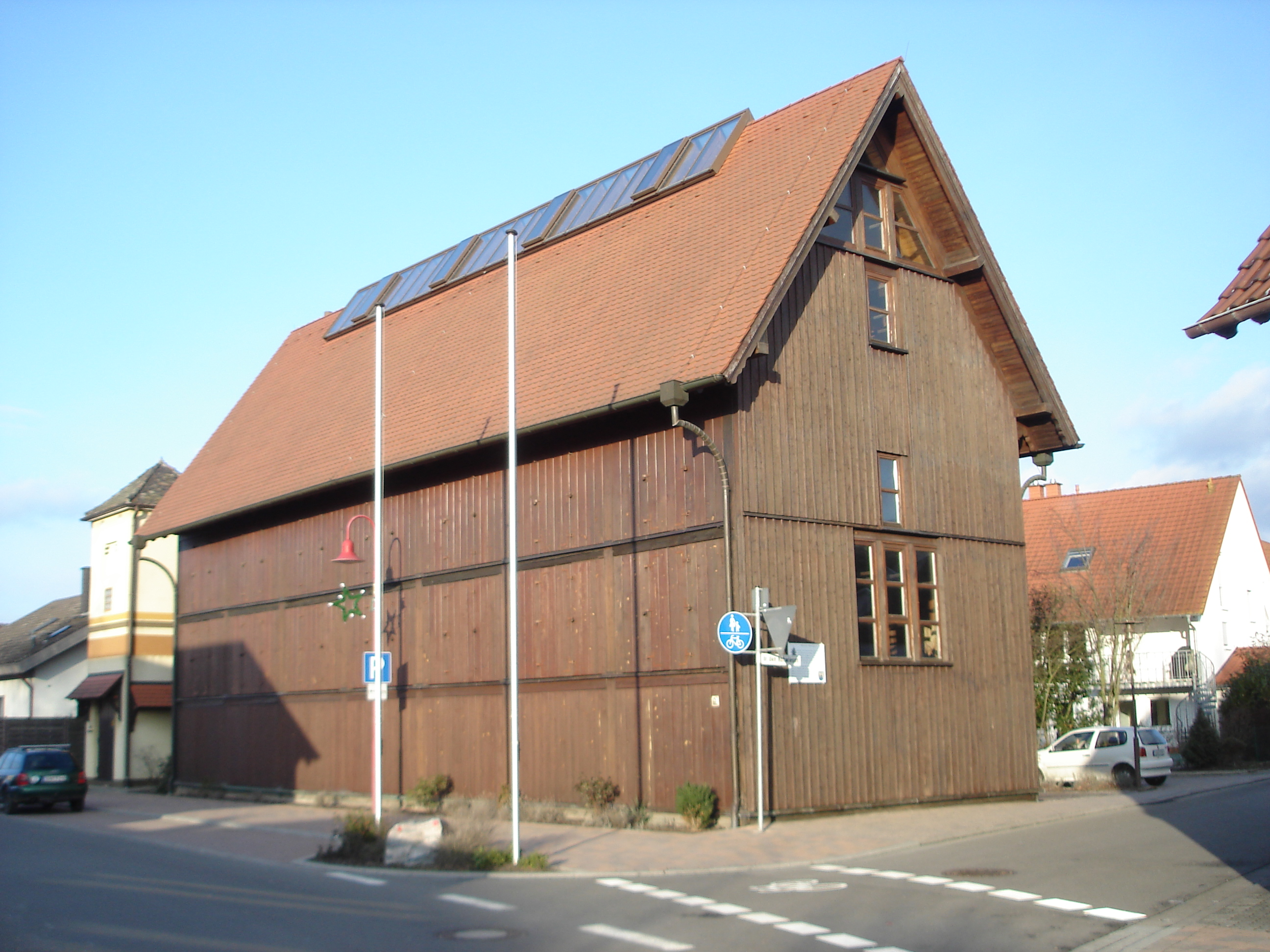 Tabakschuppen (erbaut 1852 nach den Plänen von Philipp Schwab) in 67376 Harthausen, Hanhofer Straße 10. Blick auf die Süd- und die Westseite.